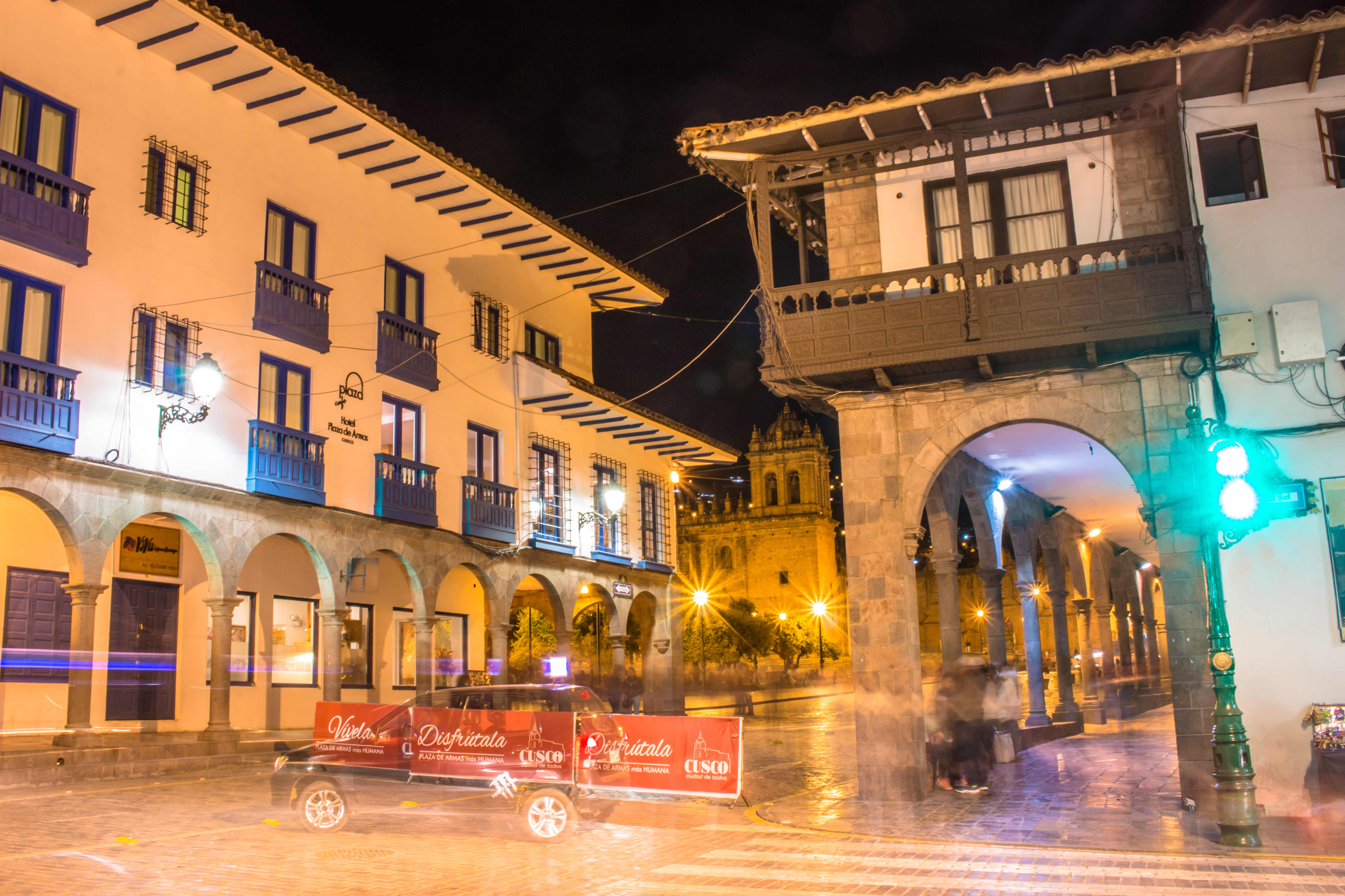 Fotografía de larga exposición que muestra el Acceso a la Playa de Armas de la ciudad del Cuzco por la Av. El Sol